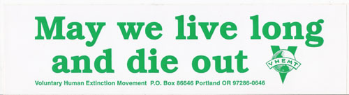 מוטו התנועה להכחדות מרצון של האנושות: "מי ייתן ונחיה עד לשיבה טובה, ואז נמות". אישור שימוש ביצירה מופיע בתחתית דף אתר התנועה: Except where noted, works on this site are licensed under a Creative Commons Attribution 3.0 United States License. org